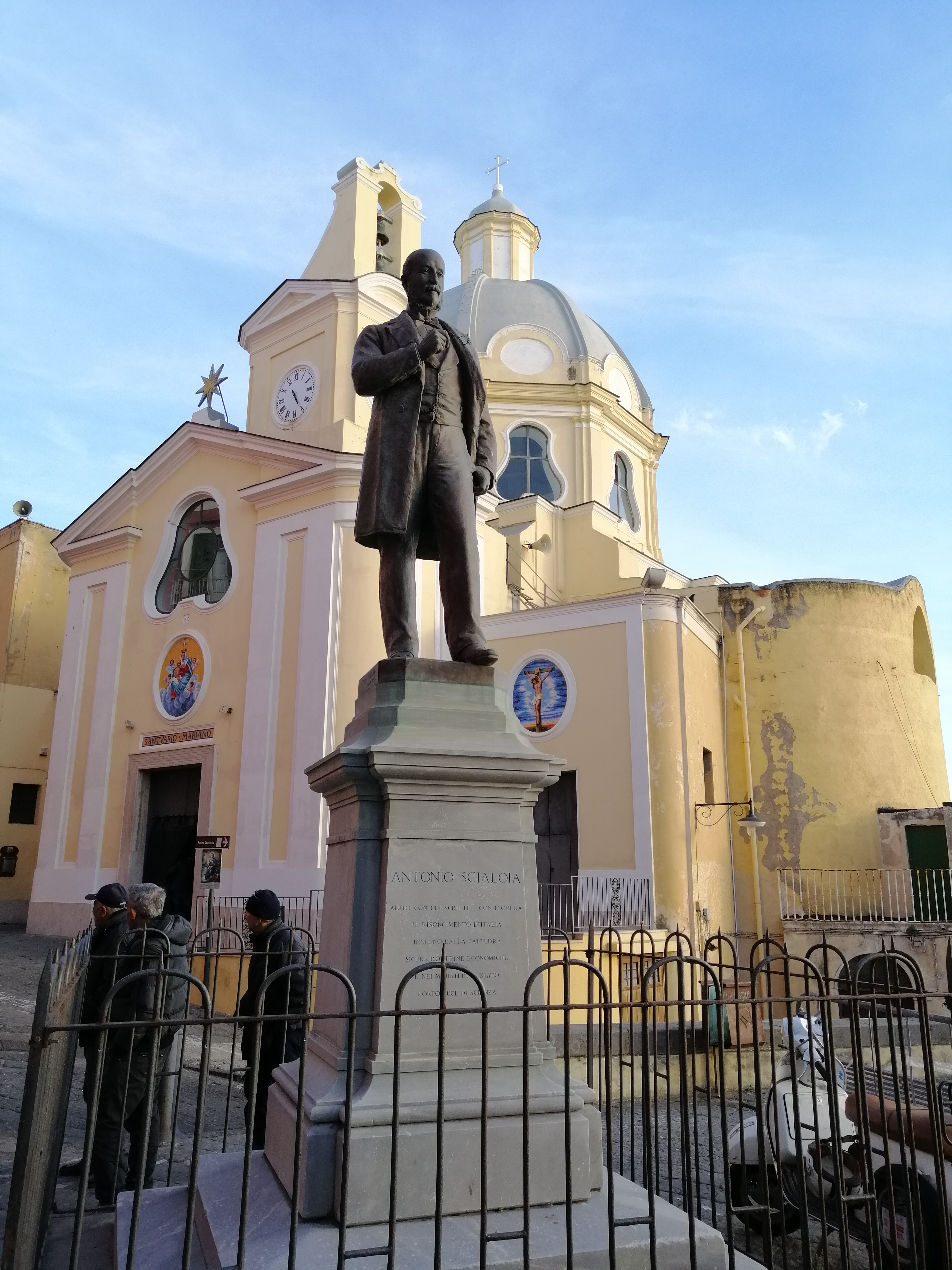 Monumento ad Antonio Scialoja a Procida, in Piazza dei Martiri; alle spalle la chiesa della Madonna delle Grazie